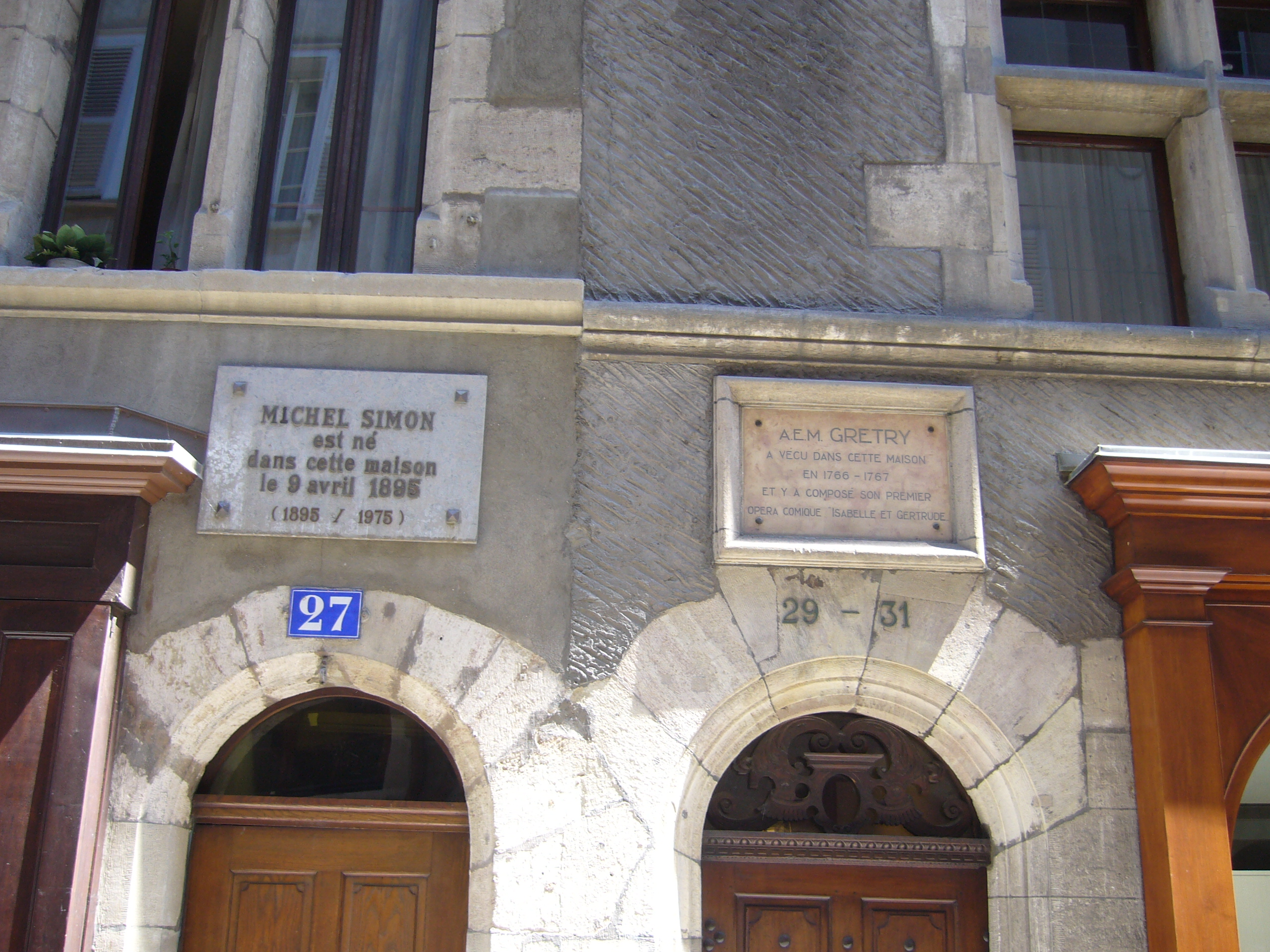 Plaques apposées sur les façades de deux maisons de Genève en l'honneur de l'acteur Michel Simon et du compositeur André Grétry.